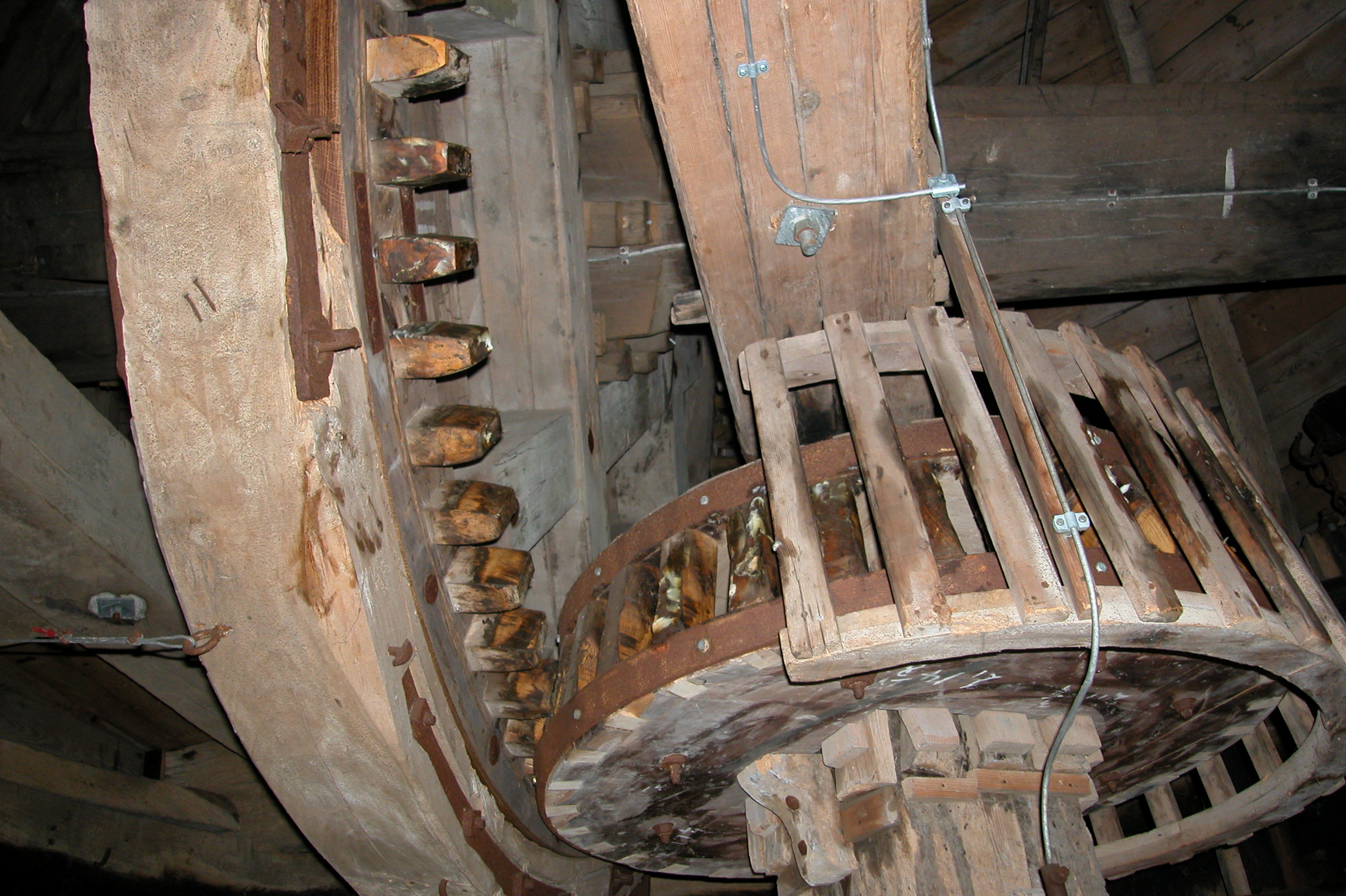 Kammrad und Bunkel in der Windmühle in Lemkenhafen auf Fehmarn von 1787